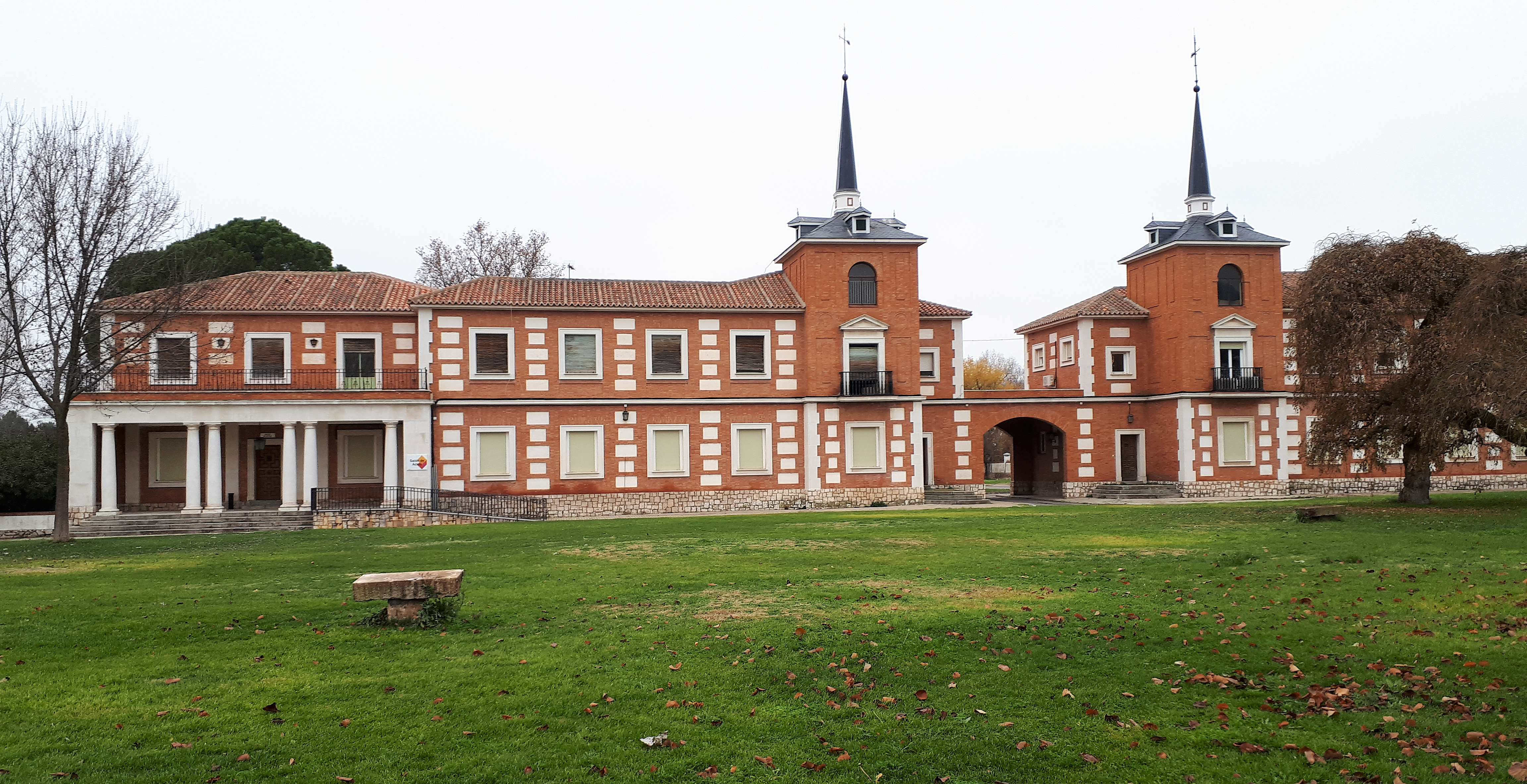 Finca "El Encín" en Alcalá de Henares (Comunidad de Madrid - España). Complejo agropecuario gestionado por el Instituto Madrileño de Investigación y Desarrollo Rural, Agrario y Alimentario (IMIDRA).